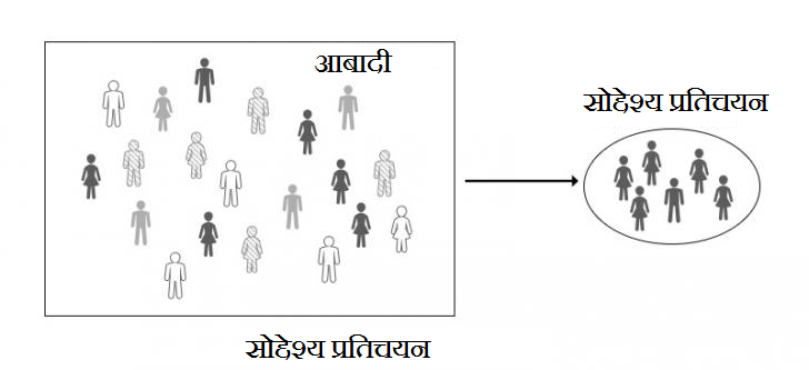 सोद्देश्य प्रतिचयन